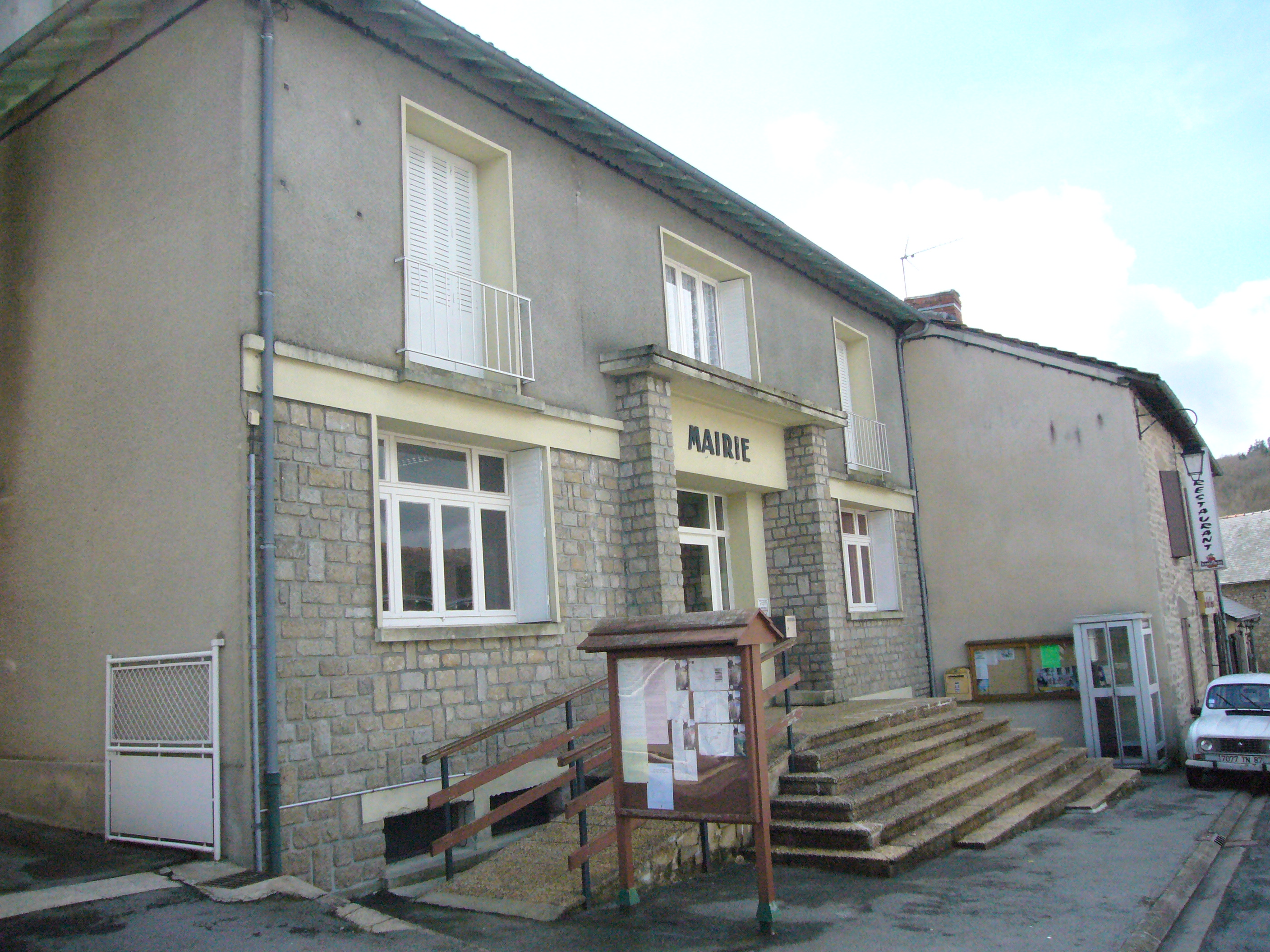 Mairie de St-Léger-la-Montagne, Haute-Vienne, France